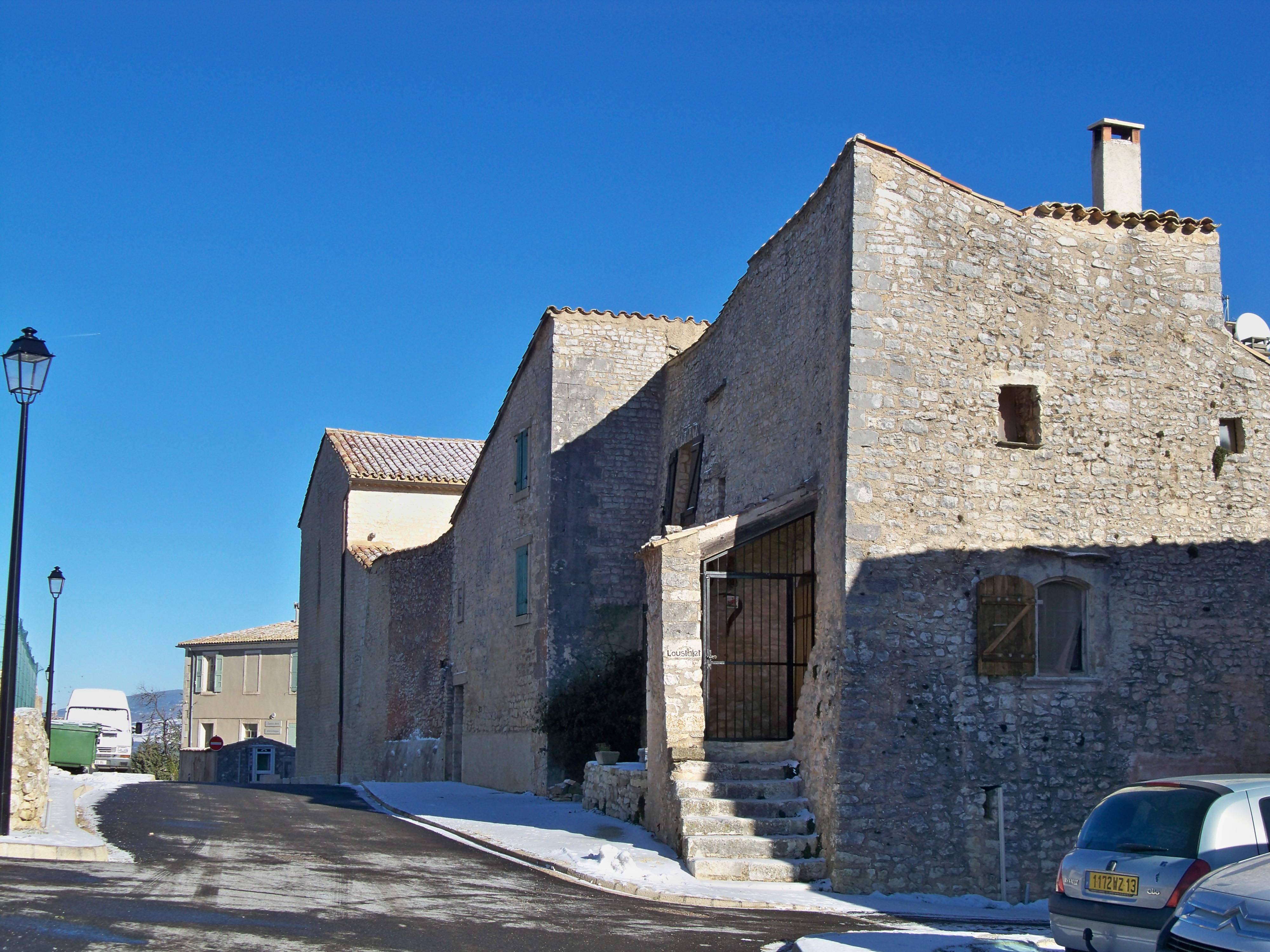 rue à Saint Christol, Vaucluse, France